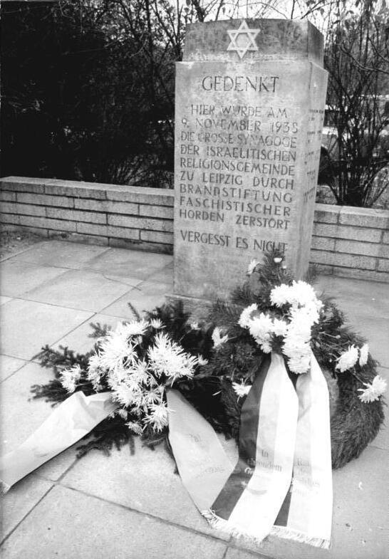 Leipzig, Gedenkstein ADN-ZB Gahlbeck 9.11.1982 Leipzig: Am 44. Jahrestag der faschistischen "Kristallnacht" wurden auch in Leipzig Kränze niedergelegt. Der Gedenkstein erinnert daran, daß an dieser Stelle die 1855 eingeweihte Große Synagoge von Leipzig stand. Nazi-Brandstifter zerstörten sie am 9. November 1938.